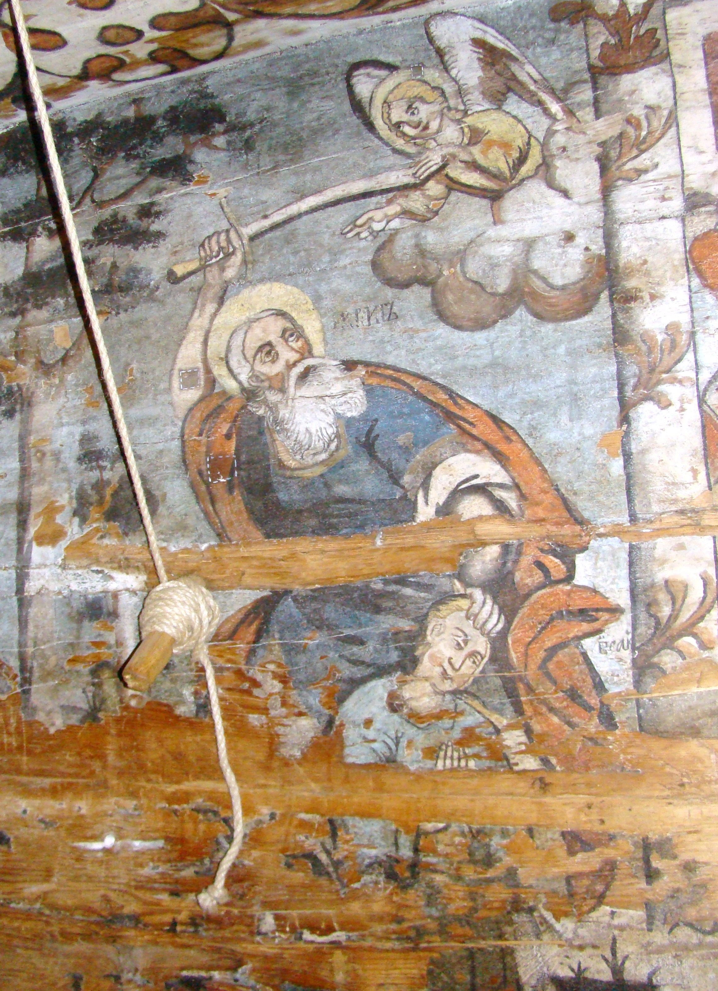 Biserica de lemn "Sf. Arhangheli", oraș Borșa, Str. Eternității 1